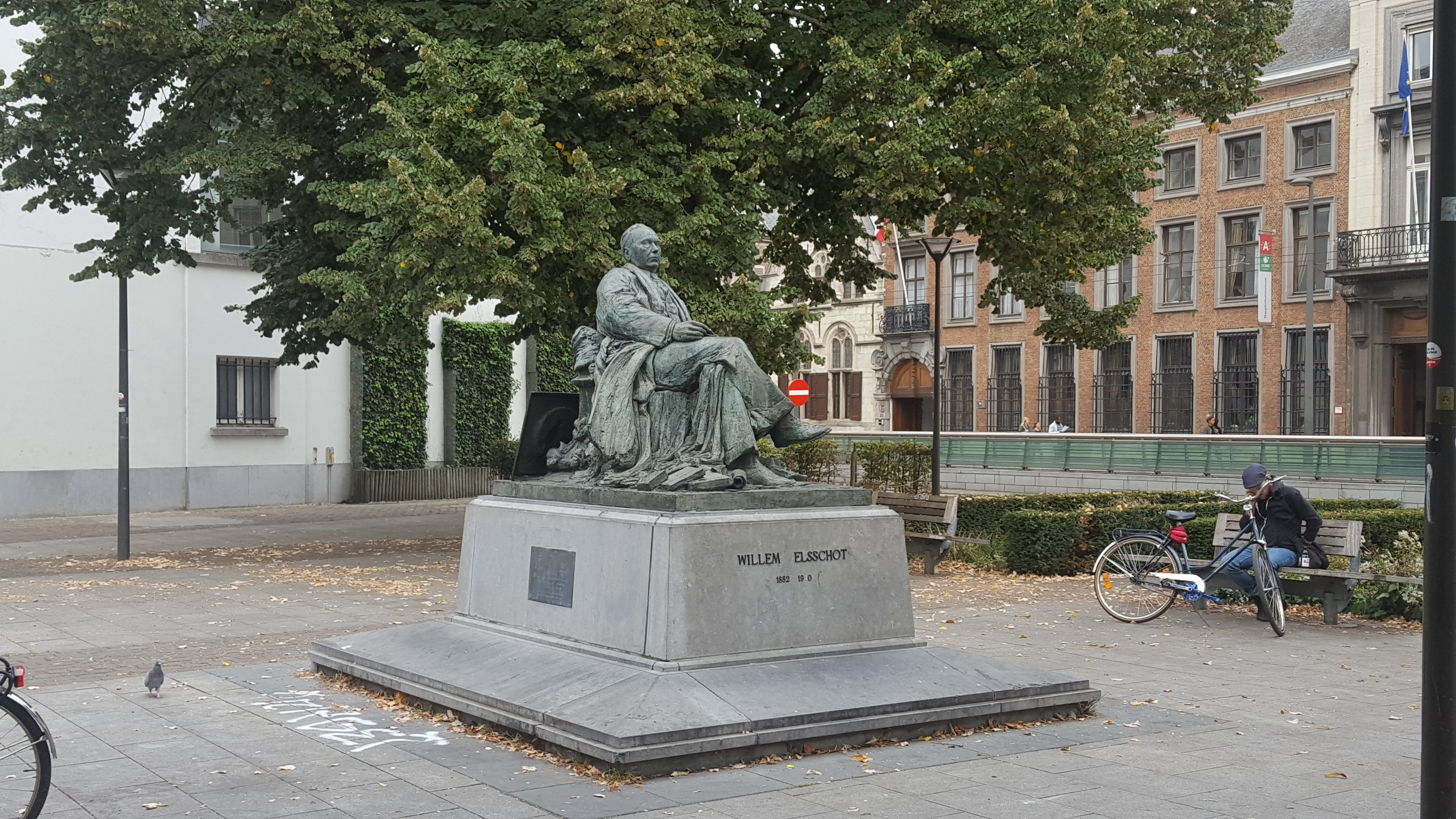 Willem Elsschot op Mechelseplein, Antwerpen, België